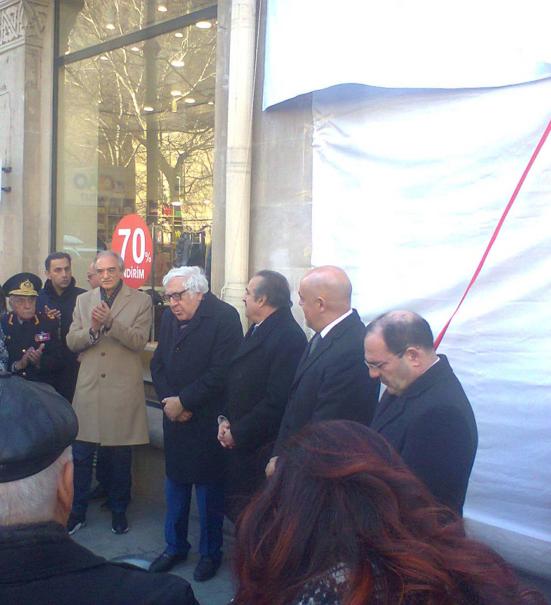 Открытие барельефа Васифу Адыгёзалову 18.02.2020. На фотографии писатель Анар и артист Полад Бюль-Бюльоглы, перед открытием